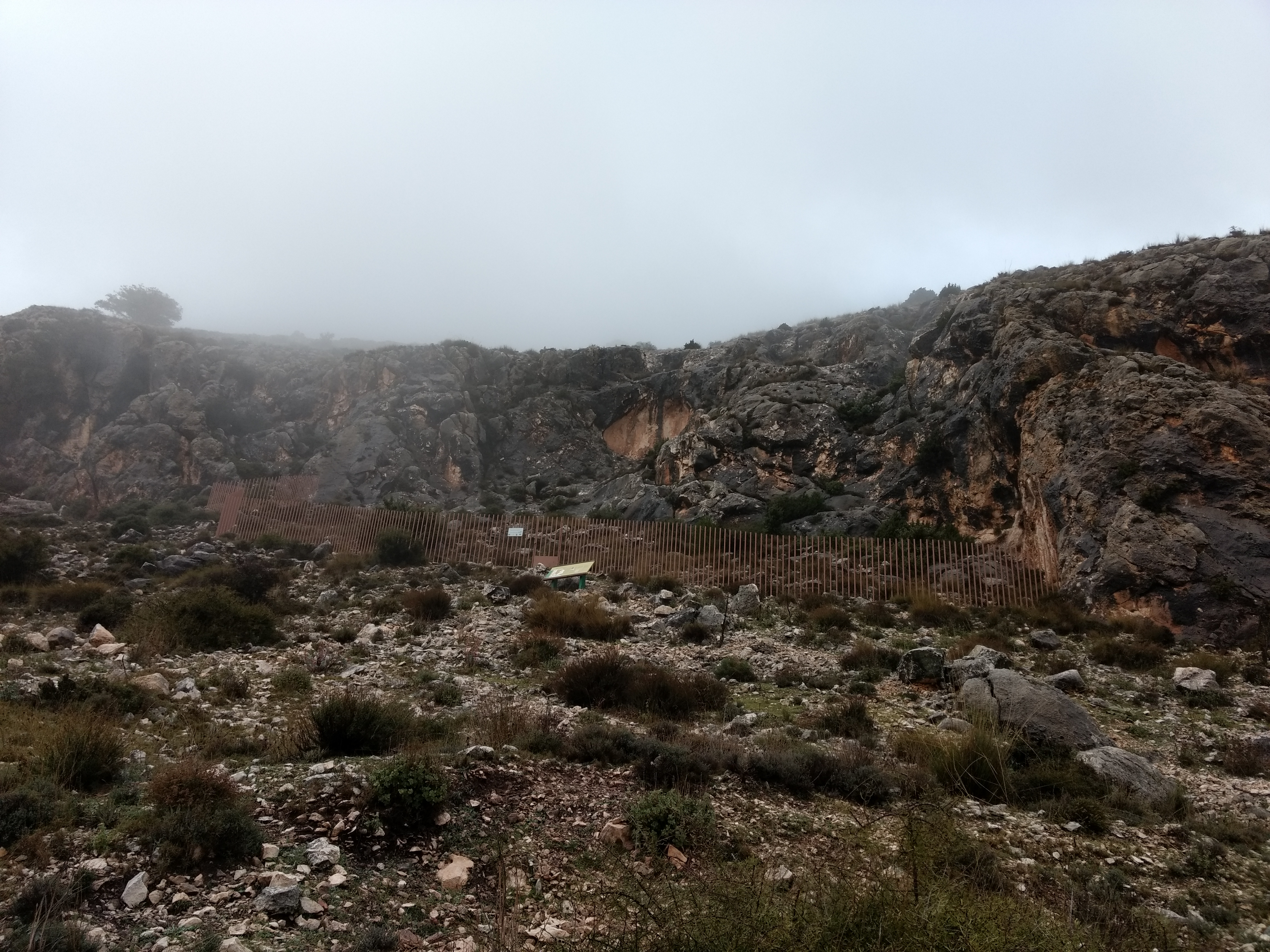 Vista del Abrigo de las Colmenas